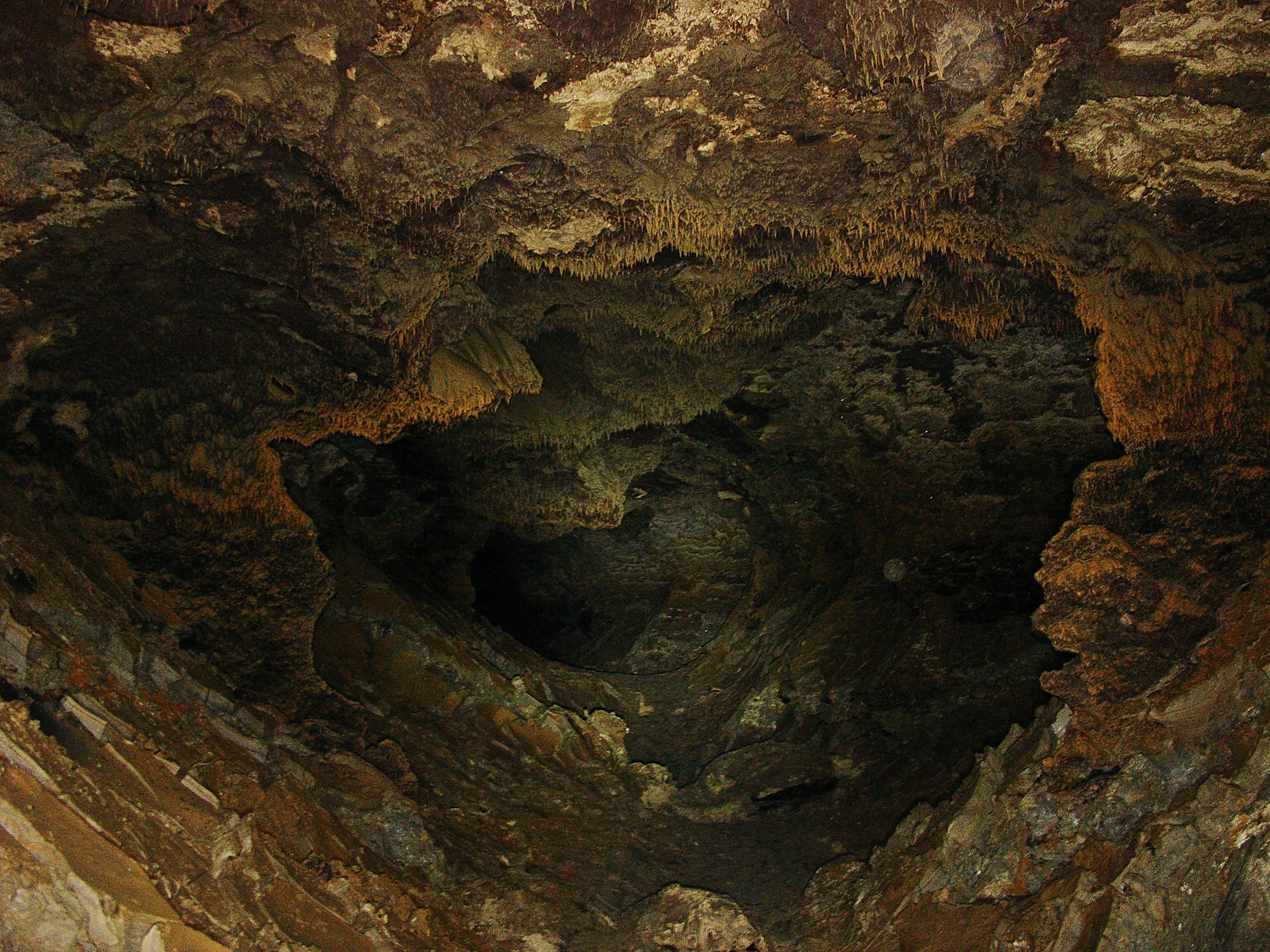 Подземный зал в пещере Золушка / им. Эмиля Раковицэ с характерными образованиями на стенах. Автор Фотографии: Олег Климов.